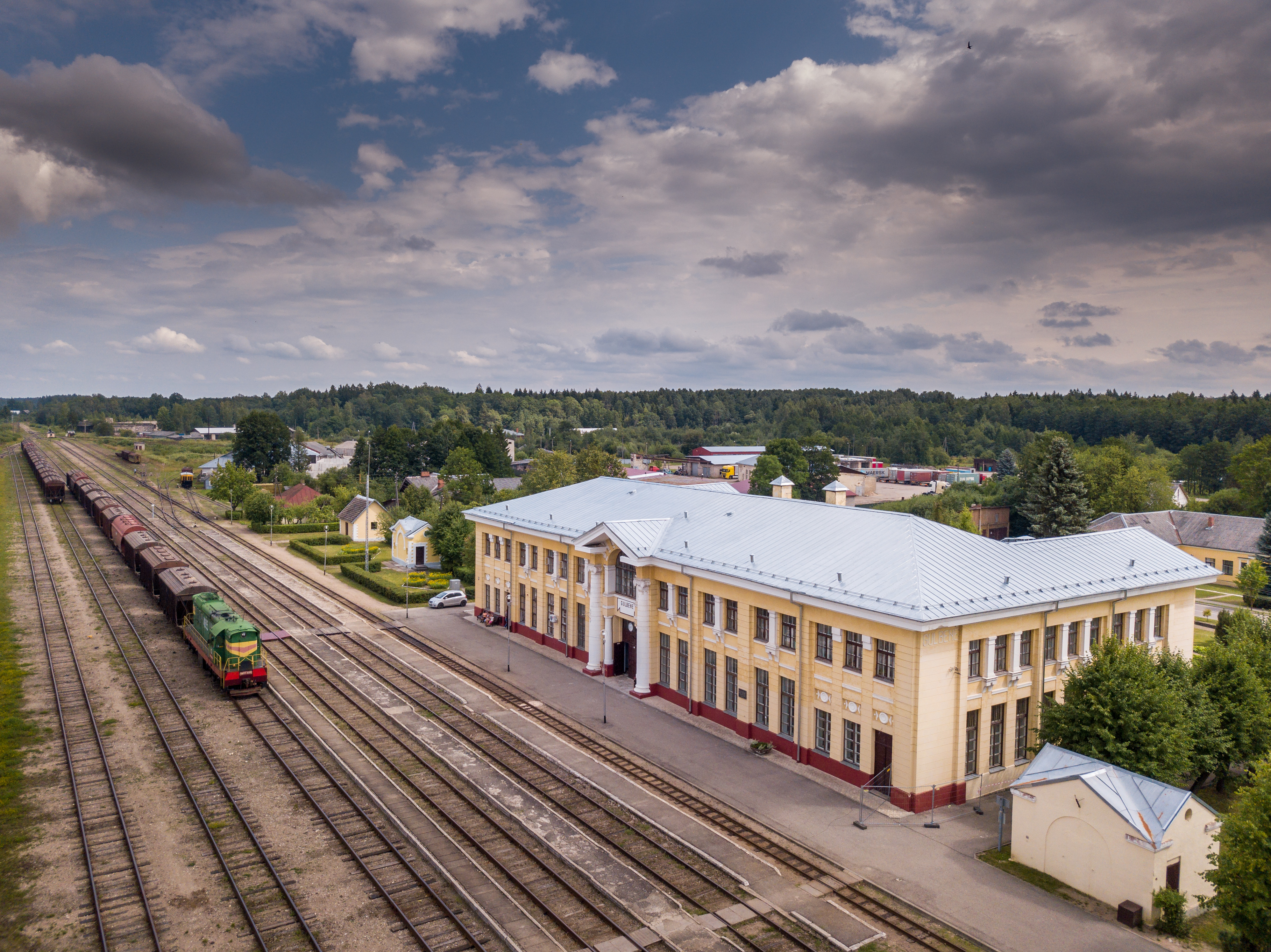 Gulbene (stacija), Gulbene, Dzelzceļa iela 8